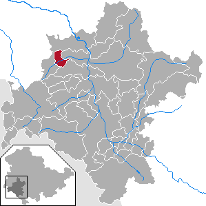 Rosa in Thuringia - District Schmalkalden-Meiningen